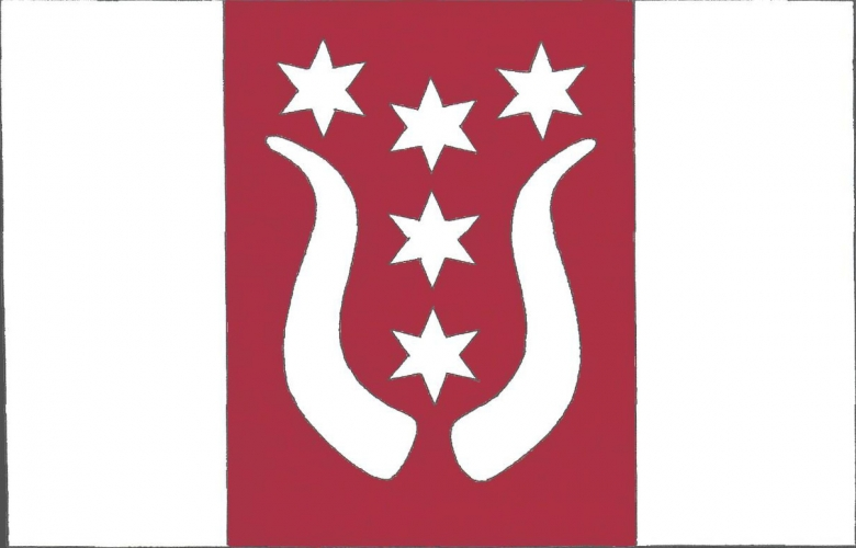 Vlajka, Mačkov, okres Strakonice